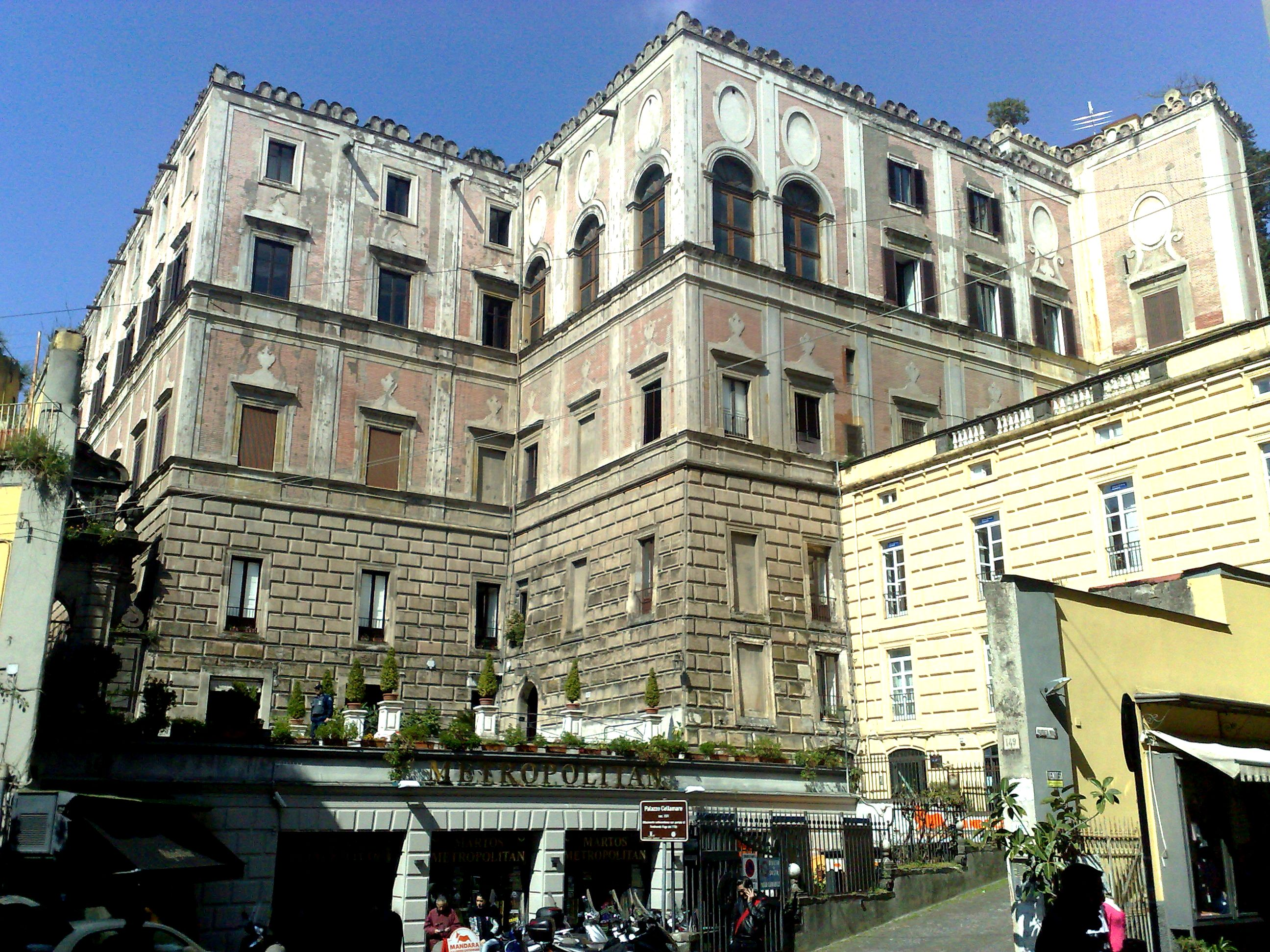 Palazzo Cellammare (Napoli)